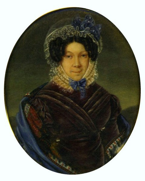 Анна Ивановна Анненкова, ур. Якоби (ум.1842), мать декабриста Ивана Александровича Анненкова (1802—1878).